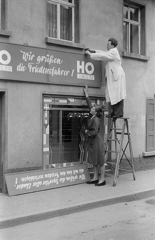 Original image description from the Deutsche FotothekMitarbeiter eines HO-Spätgeschäftes auf der Karl-Liebknecht-Straße schmücken das Geschäft anläßlich der Friedensfahrt